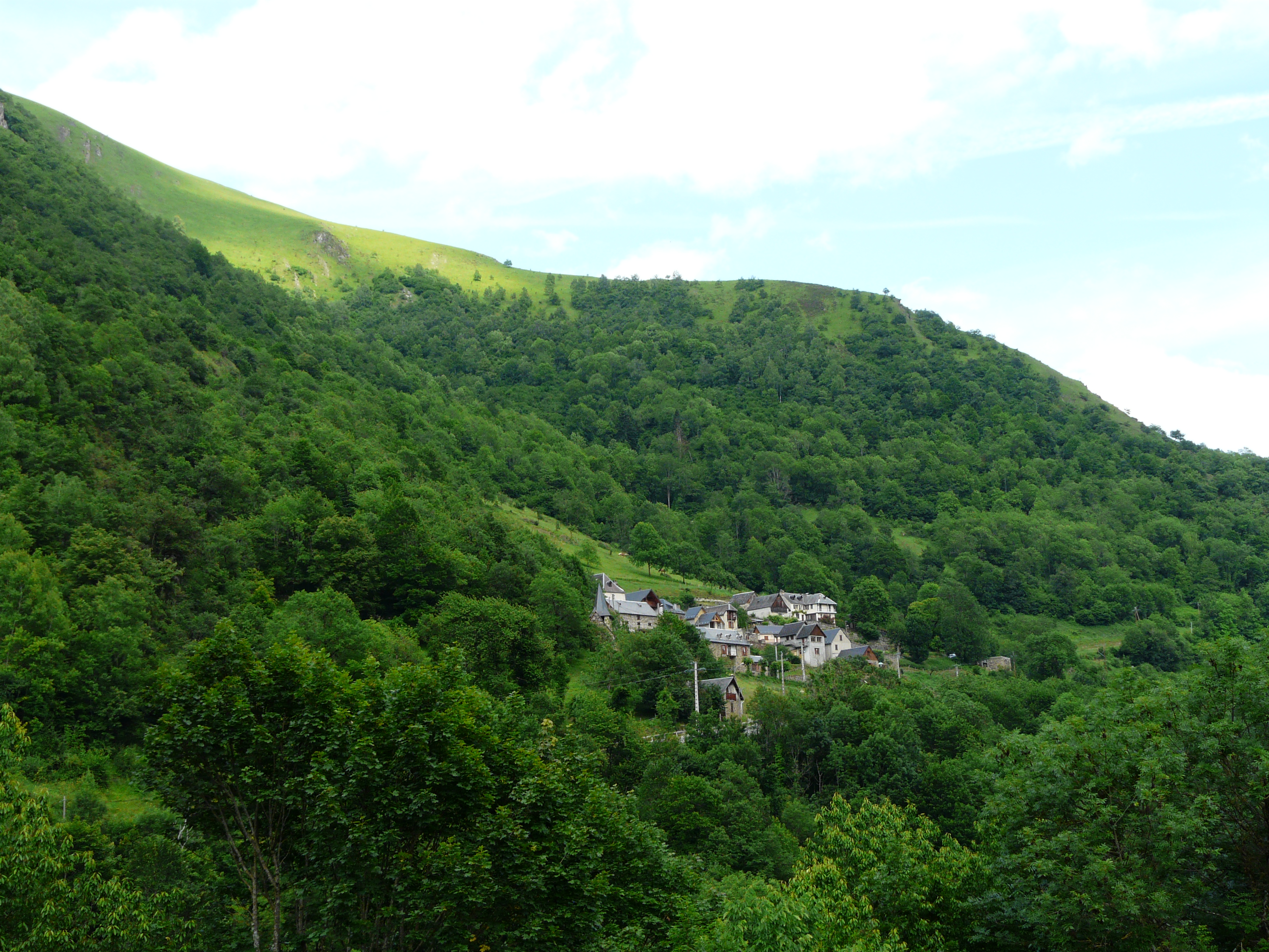 Le village de Trébons-de-Luchon vu depuis l'ouest, Haute-Garonne, France.